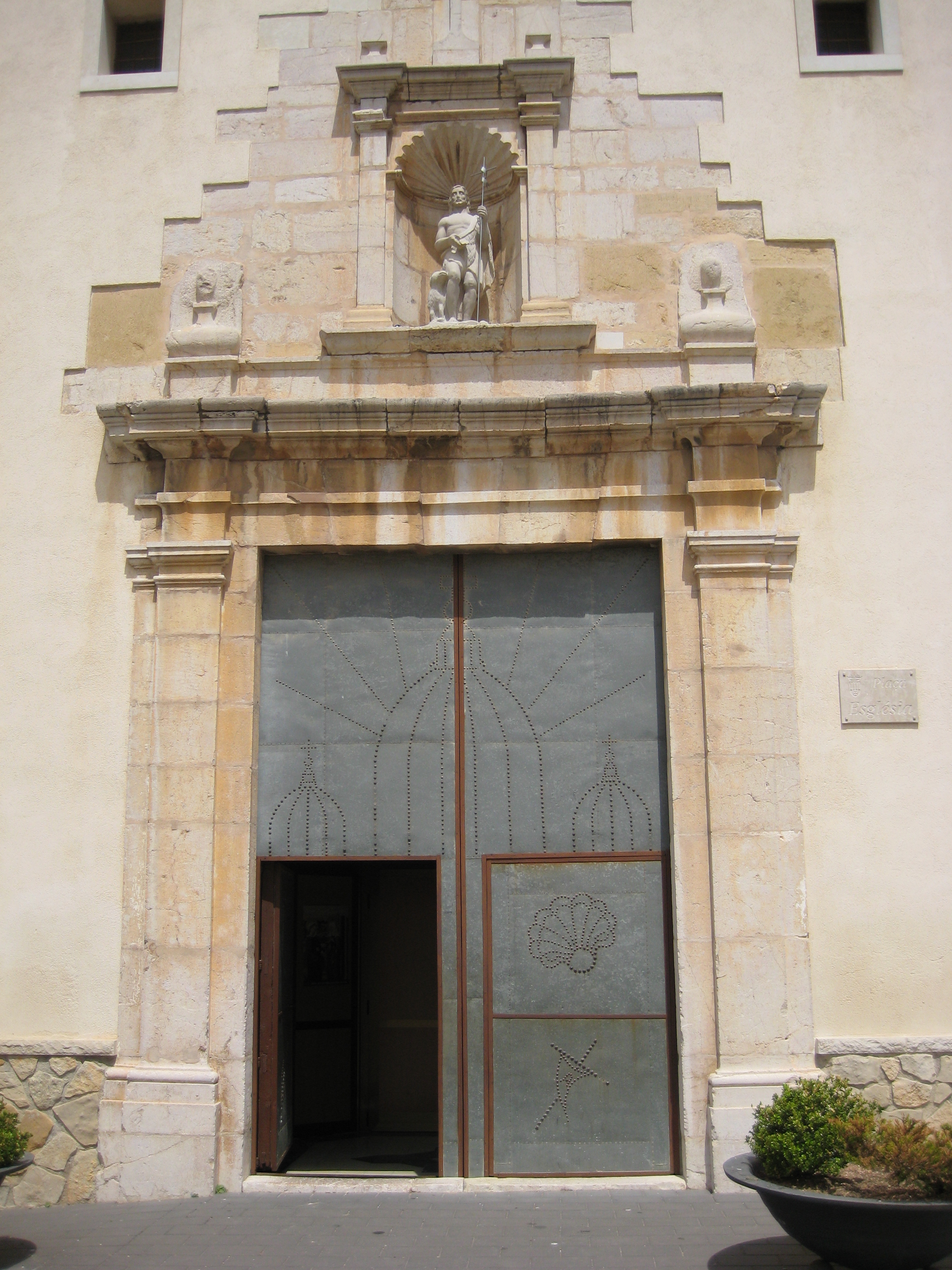 Portada de l'església dels sants Joans de Rossell (Baix Maestrat)